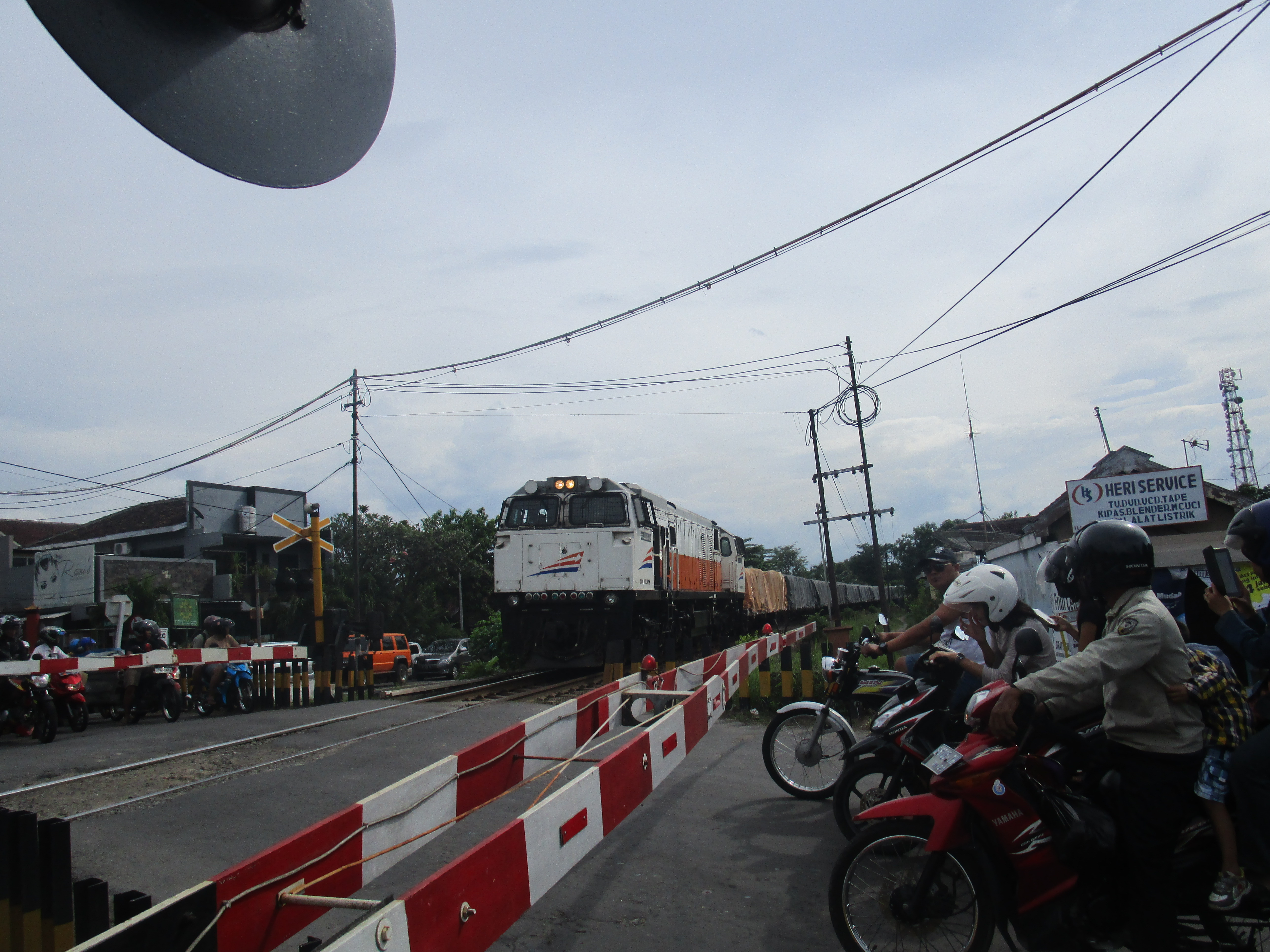 Kereta api Indocement tujuan Kalimas berangkat dari stasiun Madiun, dan melintas tikungan timur stasiun Madiun